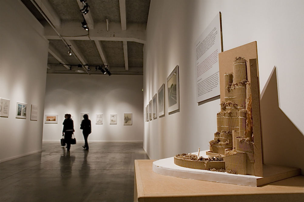 Photo exposition Lyon